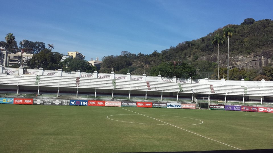 Foto do Estádio de Laranjeiras, do Fluminense Football Club, que completará 100 anos em 11 de maio de 2019.